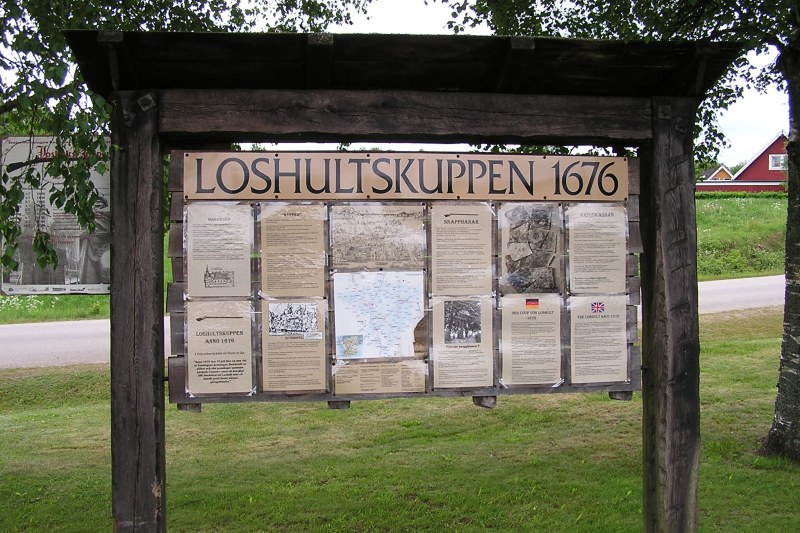 Informationstavlan vid Loshults kyrka om Loshultskuppen.